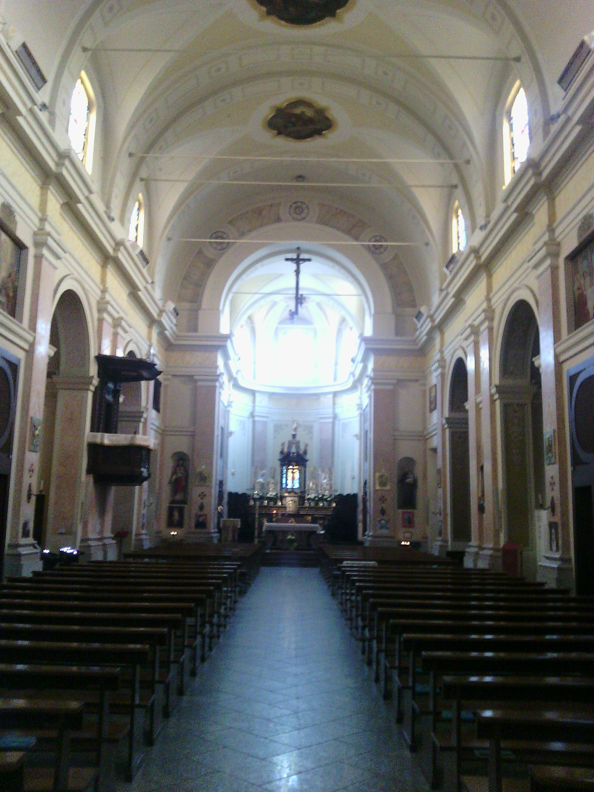 Interno della chiesa parrocchiale di Marcallo con Casone (MI) - Italy